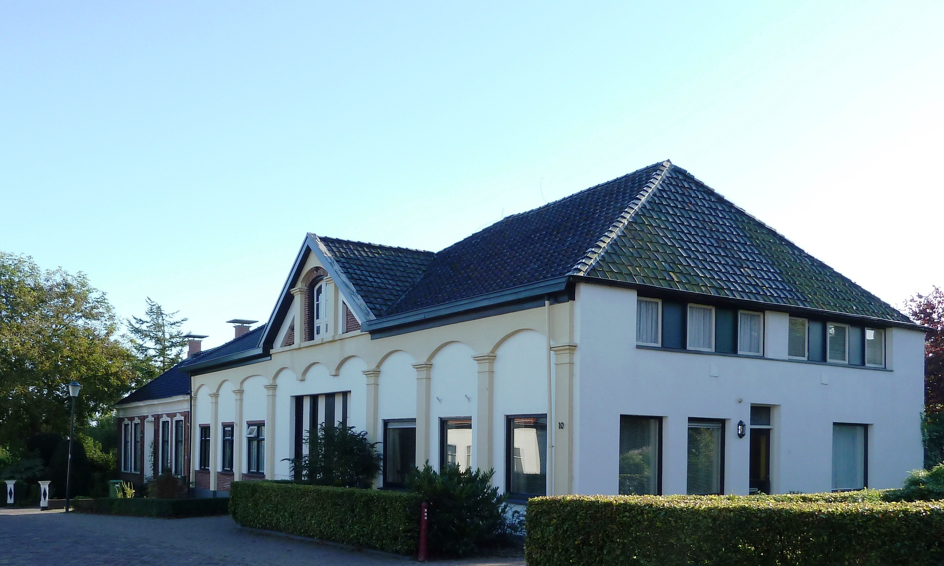 Voormalige lagere school met aangebouwde meesterswoning (1863) aan de Wierdeweg 10 in Leermens. In 1935 gesloten, later een tijdlang locatie van een kruidenier.